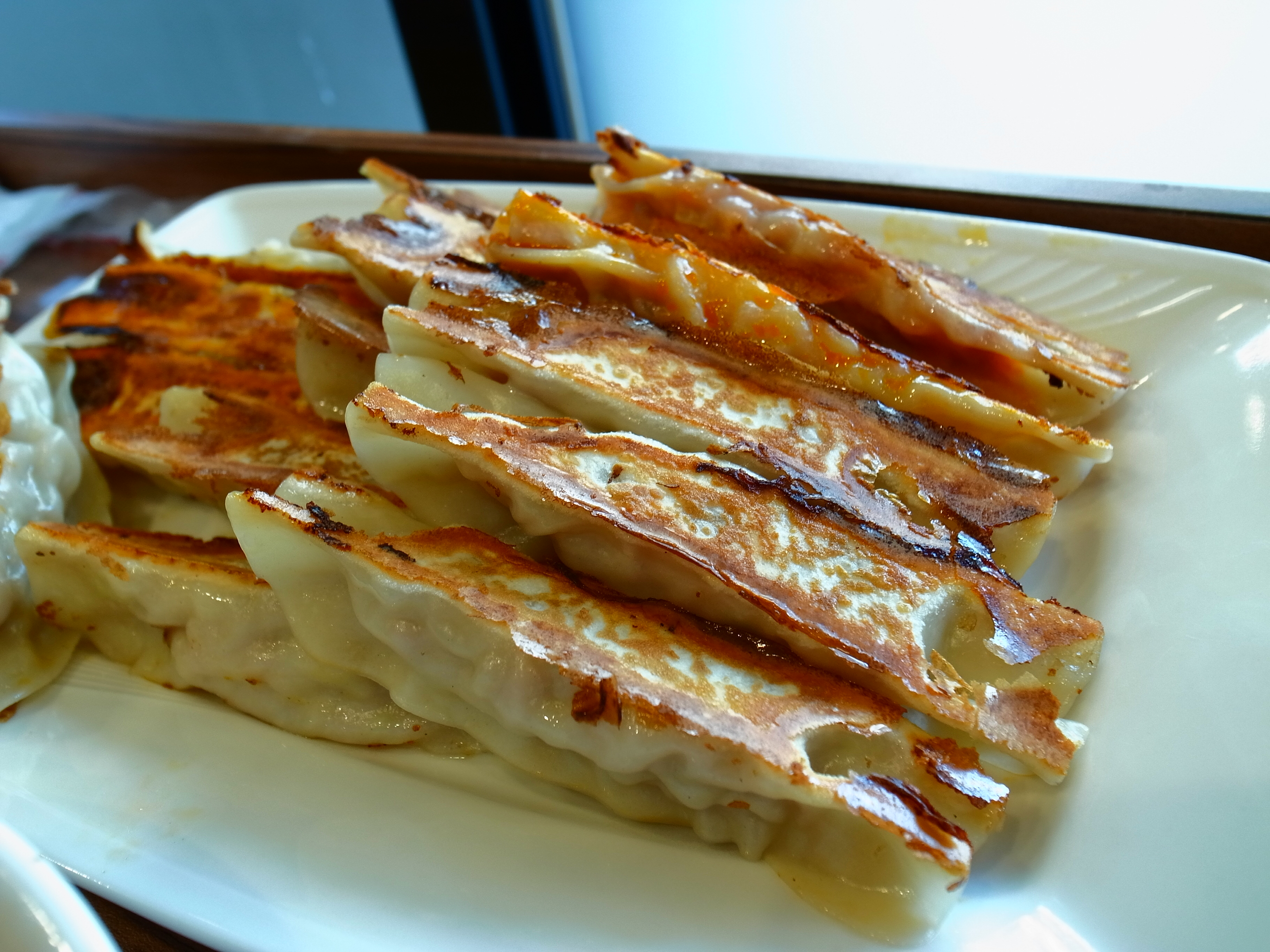 八方雲集鍋貼水餃專賣店鍋貼15顆。